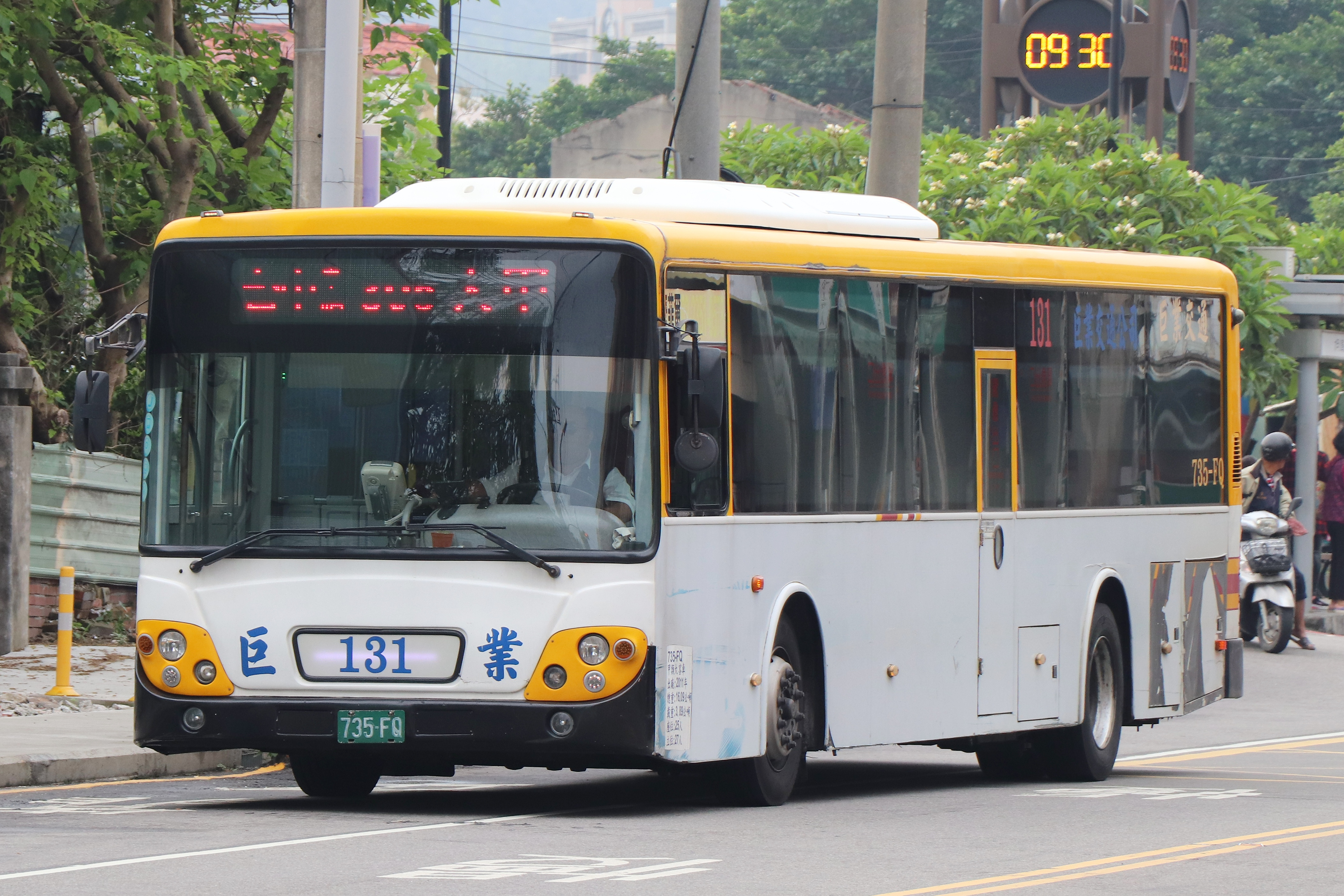 巨業交通 大宇BS120CN大客車 735-FQ